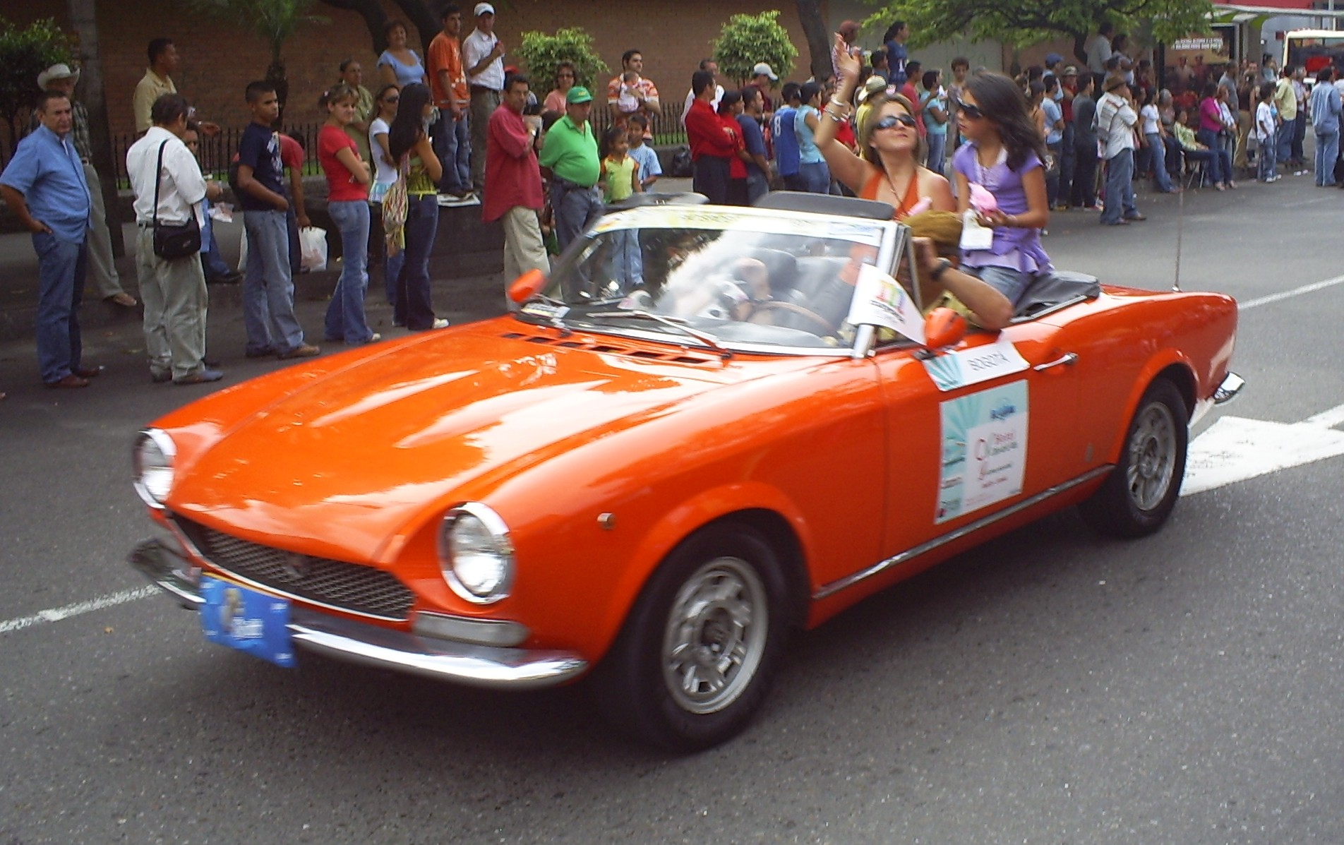 Desfile de Autos Clásicos y Antiguos en la Feria de las Flores, Medellín, Colombia